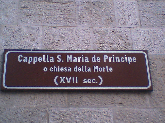 Curioso nombre de una antigua Iglesia del sur de Italia.